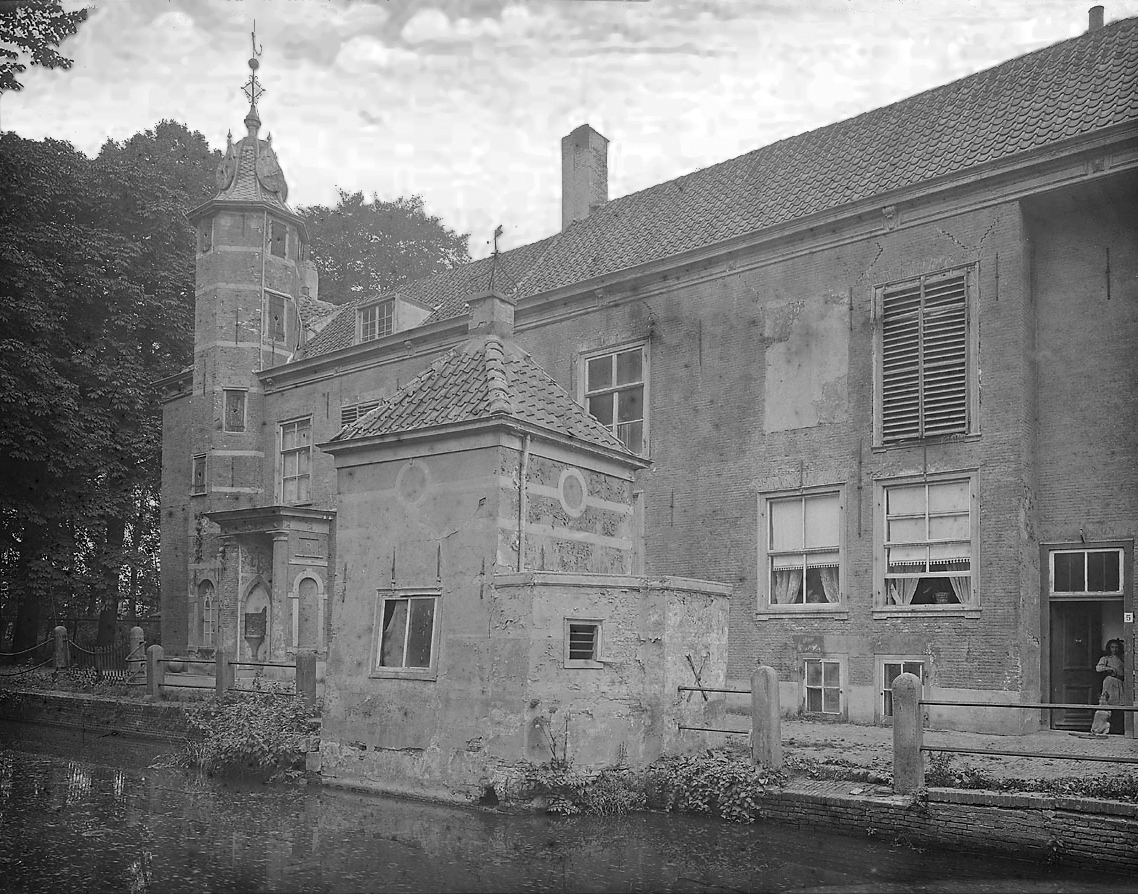 Westgevel van Huis te Hoorn anno 1915